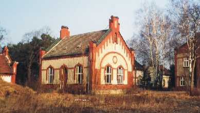 Das Maschinenhaus des Wasswerwerk Altglienicke